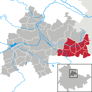 Verwaltungsgemeinschaft Buttstädt in Thuringia - District Sömmerda